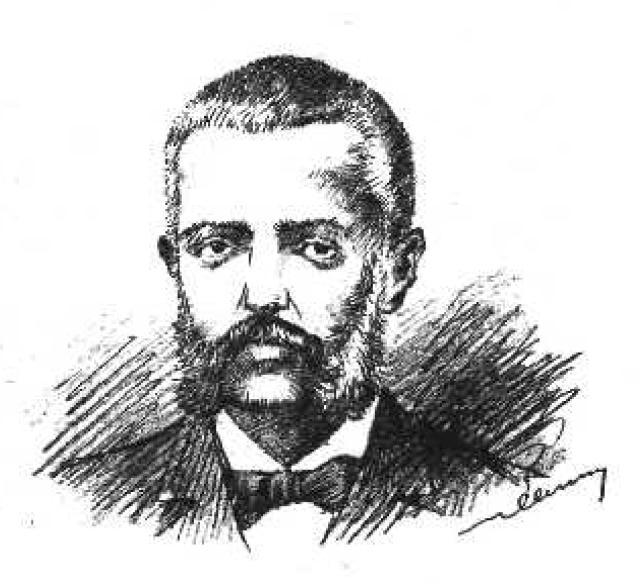 griechischer Politiker, 19. Jahrhundert